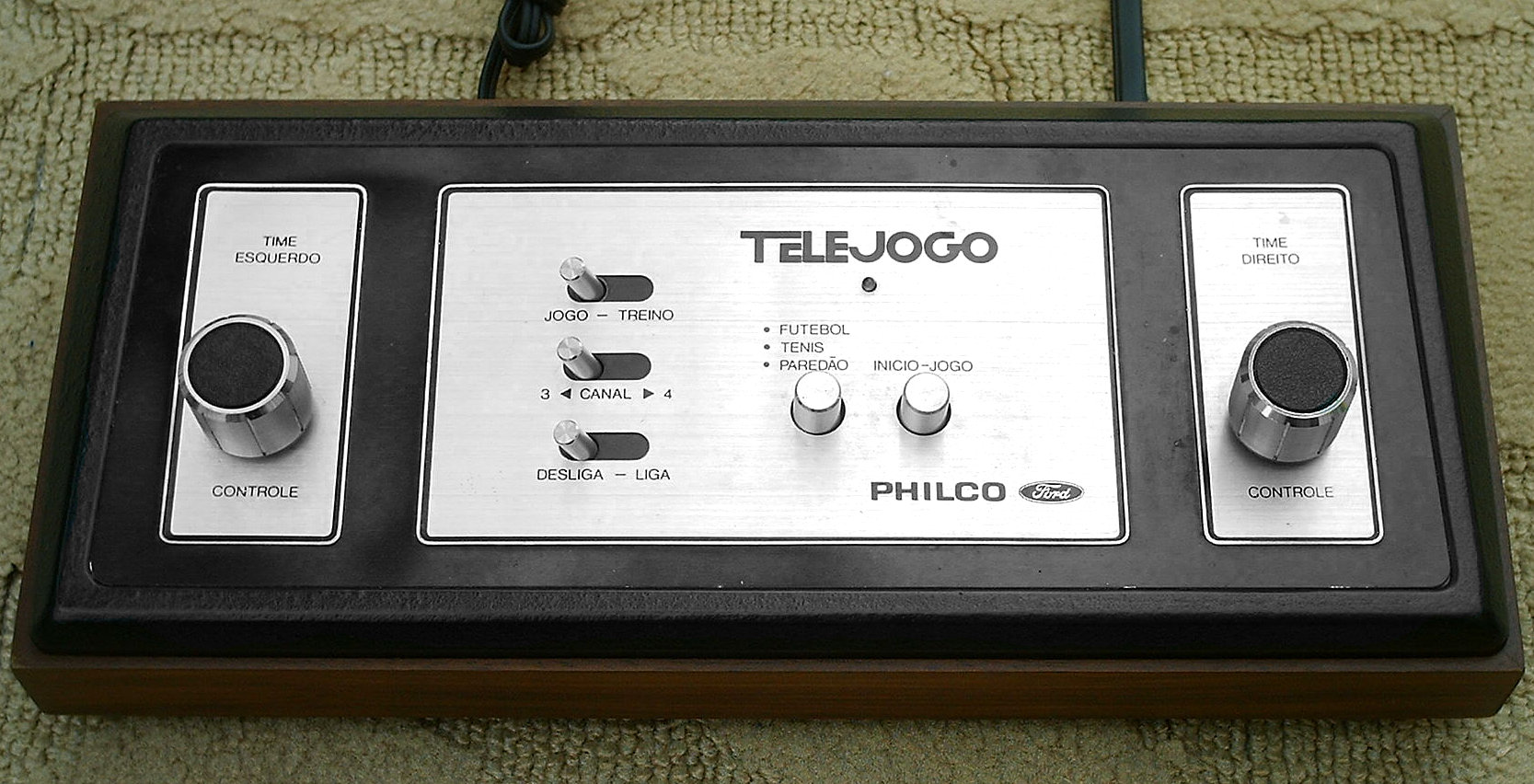 Console do antigo Telejogo de 1977.